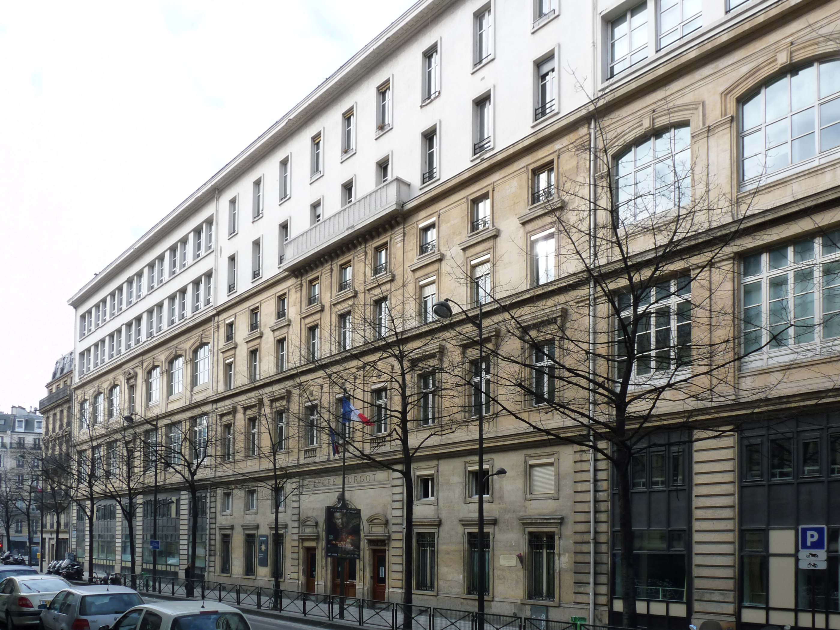 La façade du lycée Turgot sur la rue de Turbigo, Paris-III